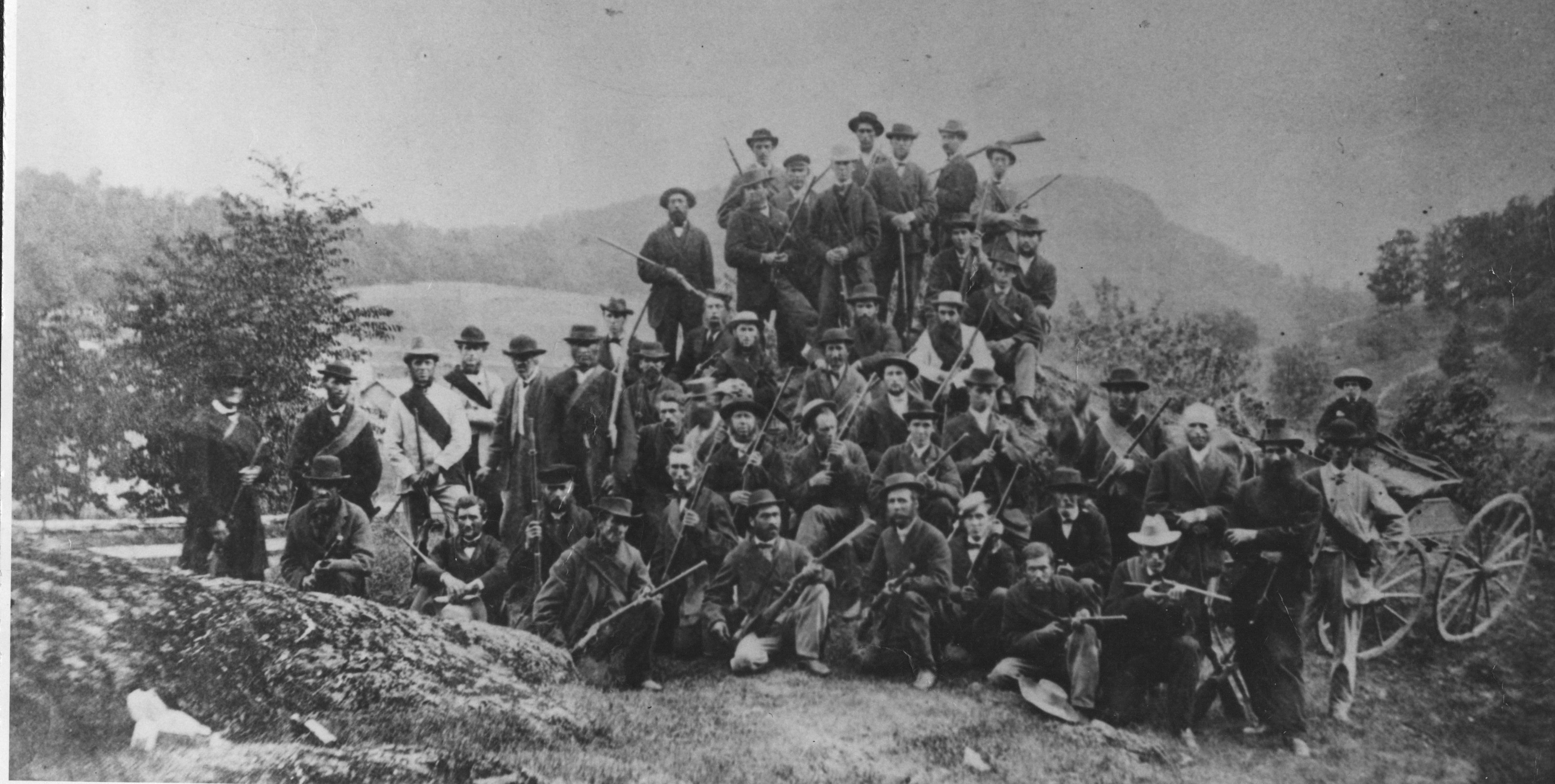 Les Red Sashes (Écharpes Rouges) étaient une milice organisée dans le secteur St-Armand, Frelighsburg (Missiquoi) contre les attaques des Fenians (Féniens)